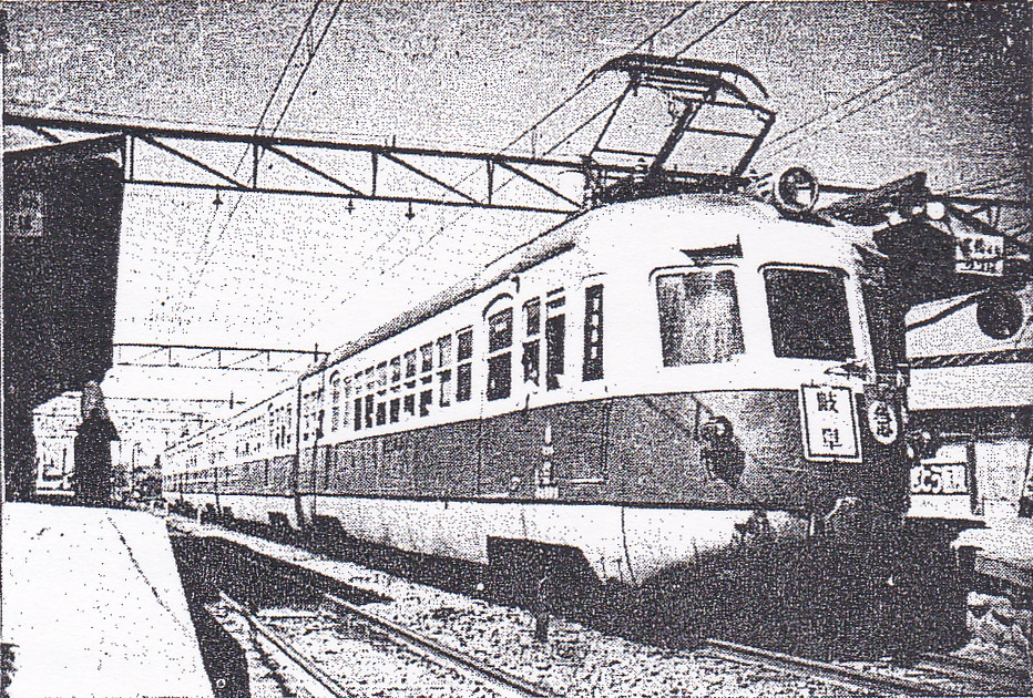 名鉄3400系電車3401編成（モ3401-サ2451-モ3451-ク2401）。4両編成化後、重整備工事施工前の原形を保っていた当時。須ヶ口駅にて撮影。